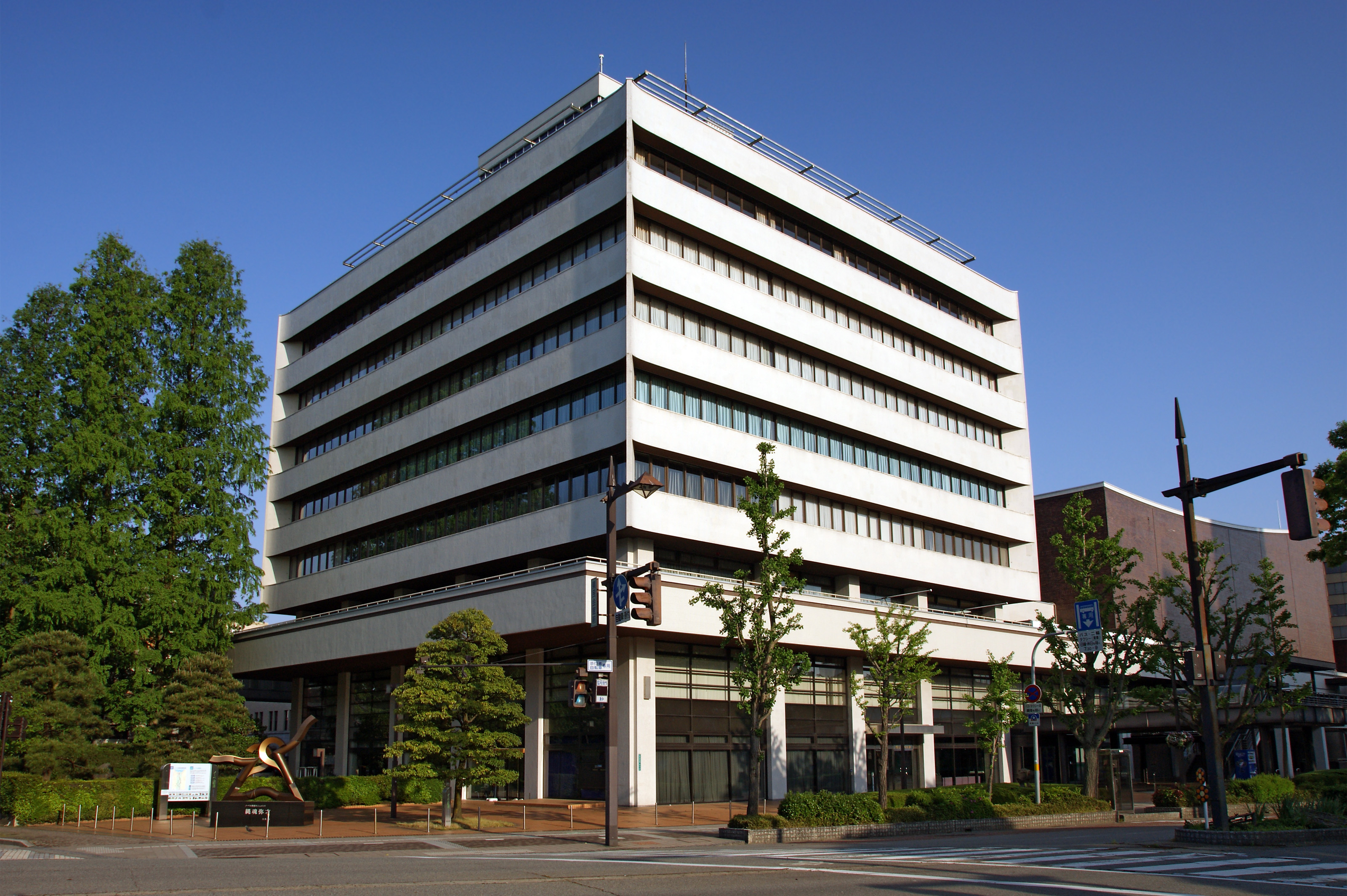 Toyama-kenminkaikan in Toyama, Toyama prefecture, Japan